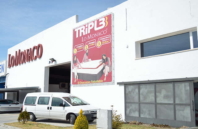 Grupo Lo Monaco es una empresa española con sede en Granada fundada por Livio Lo Monaco y Beatriz Muñoz. Su actividad ha sido reconocida principalmente por la venta de equipos de descanso y sobre todo por introducir los colchones de Látex en España, aunque comenzaron su andadura vendiendo artículos de menaje para el hogar.